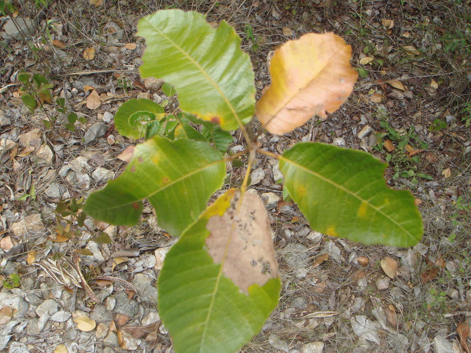 Serrasuela (Thouinia portoricensis), Bosque tropical seco de Guánica, Puerto Rico.